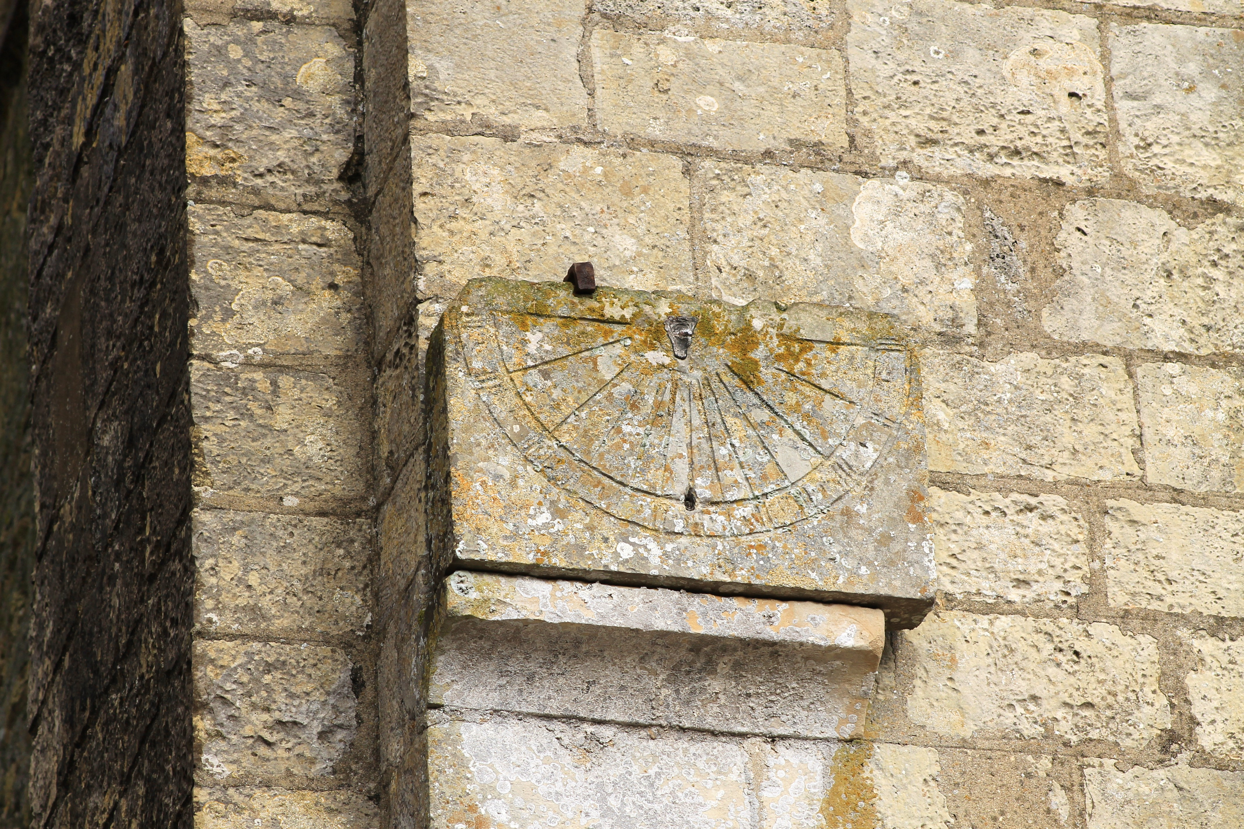 Cadran solaire sans gnomon sur l'église Notre-Dame-de-la-Visitation à Blonville-sur-Mer (Calvados)